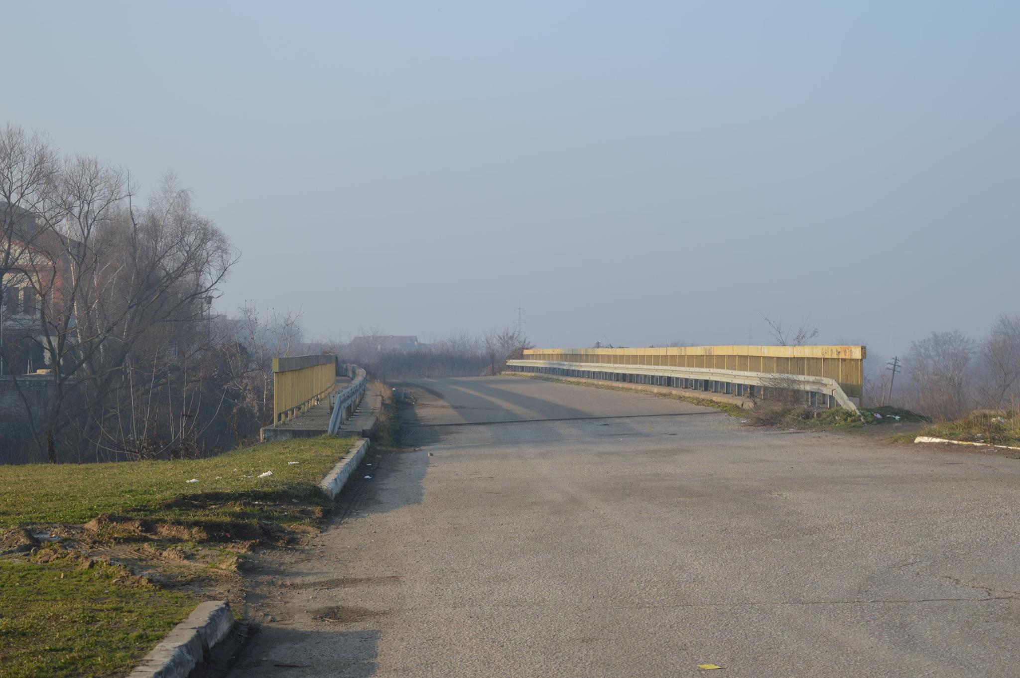 Српски (ћирилица): Мост који није у употреби